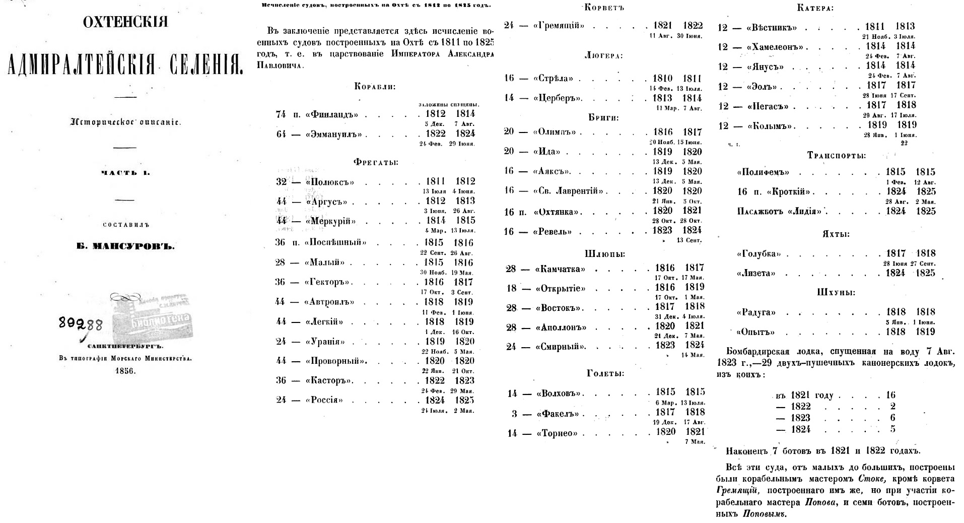 Копия страниц книги